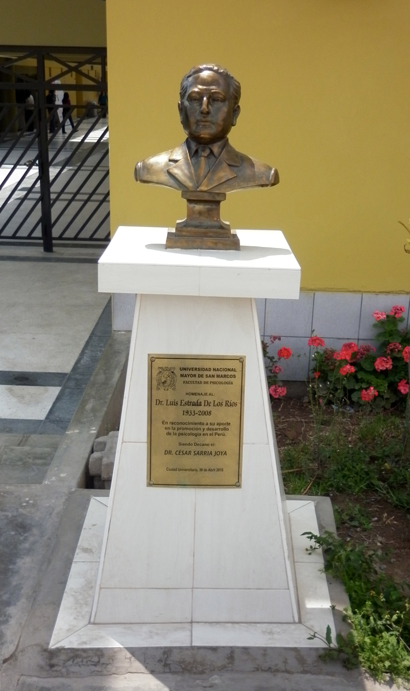 Monumento de Luis Estrada de los Ríos en el exterior de la Facultad de Psicología de la Universidad Nacional Mayor de San Marcos